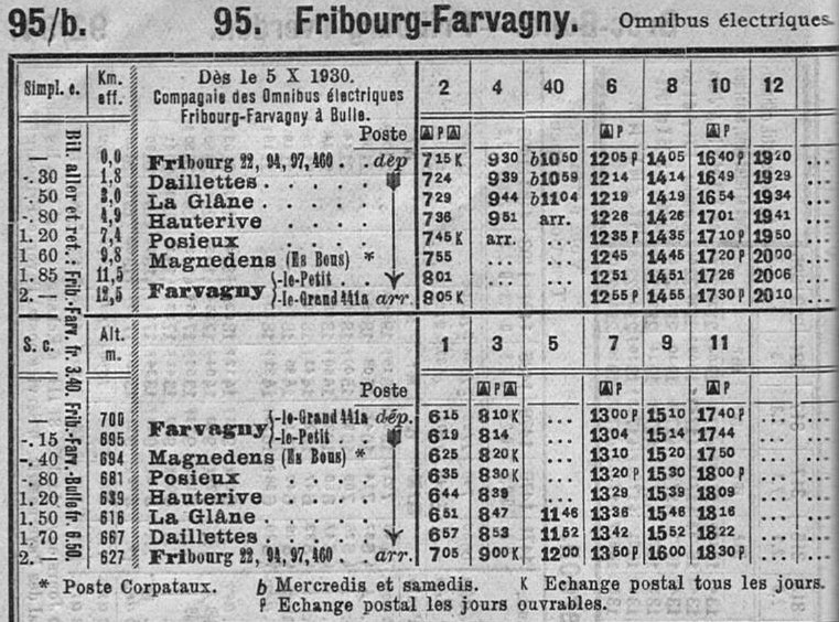 Winterfahrplan für die Gleislose Bahn Freiburg–Farvagny